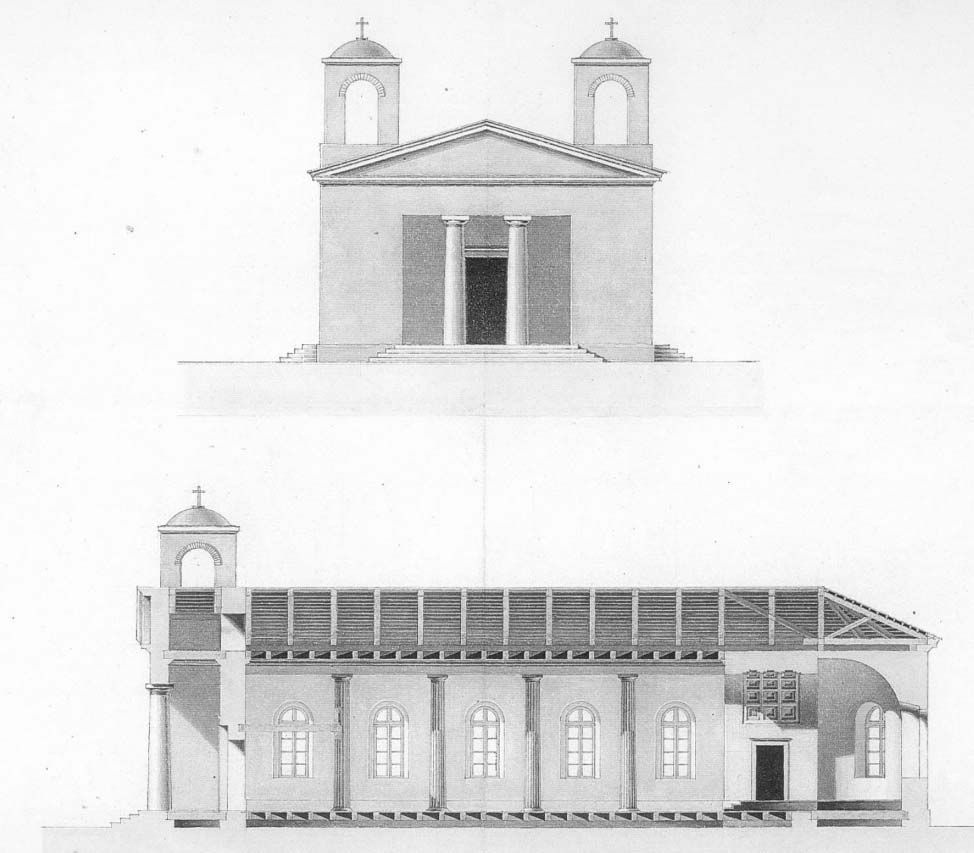 Entwurf der katholischen Kirche bei Rastadt (Kolonistenbezirk Beresan)